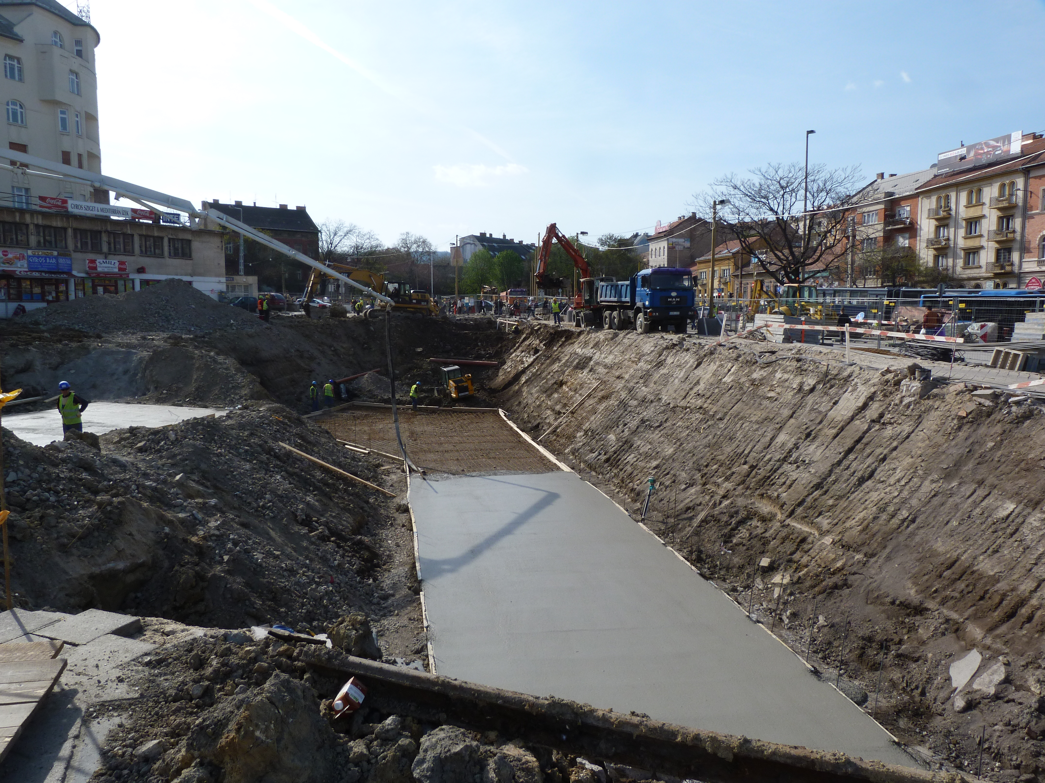 A felvétel 2015. április 14-én készült Budapesten, a Széll Kálmán téren. ©© Derzsi Elekes Andor, Budapest, 2015, A fénykép másolását és felhasználását a szerző ellenérték nélkül megengedi. Az engedély kiterjed a kereskedelmi célú hasznosításra is. Kéri azonban nevének feltüntetését a felhasználás során. A Metapolisz sorozat valamennyi képe és filmje Creative Commons alatti. kereskedelmi - for profit - célra is felhasználható. Ajánlott hivatkozás: Derzsi Elekes Andor: Metapolisz DVD line